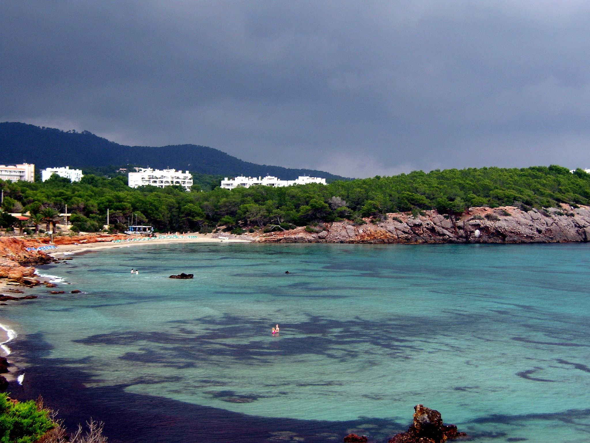 Es Canar - Santa Eulària des Riu